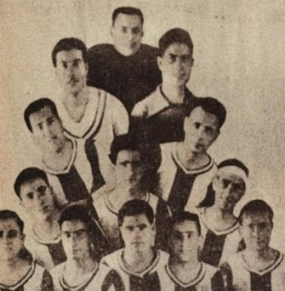 Primera plantilla del Hèrcules C.F.